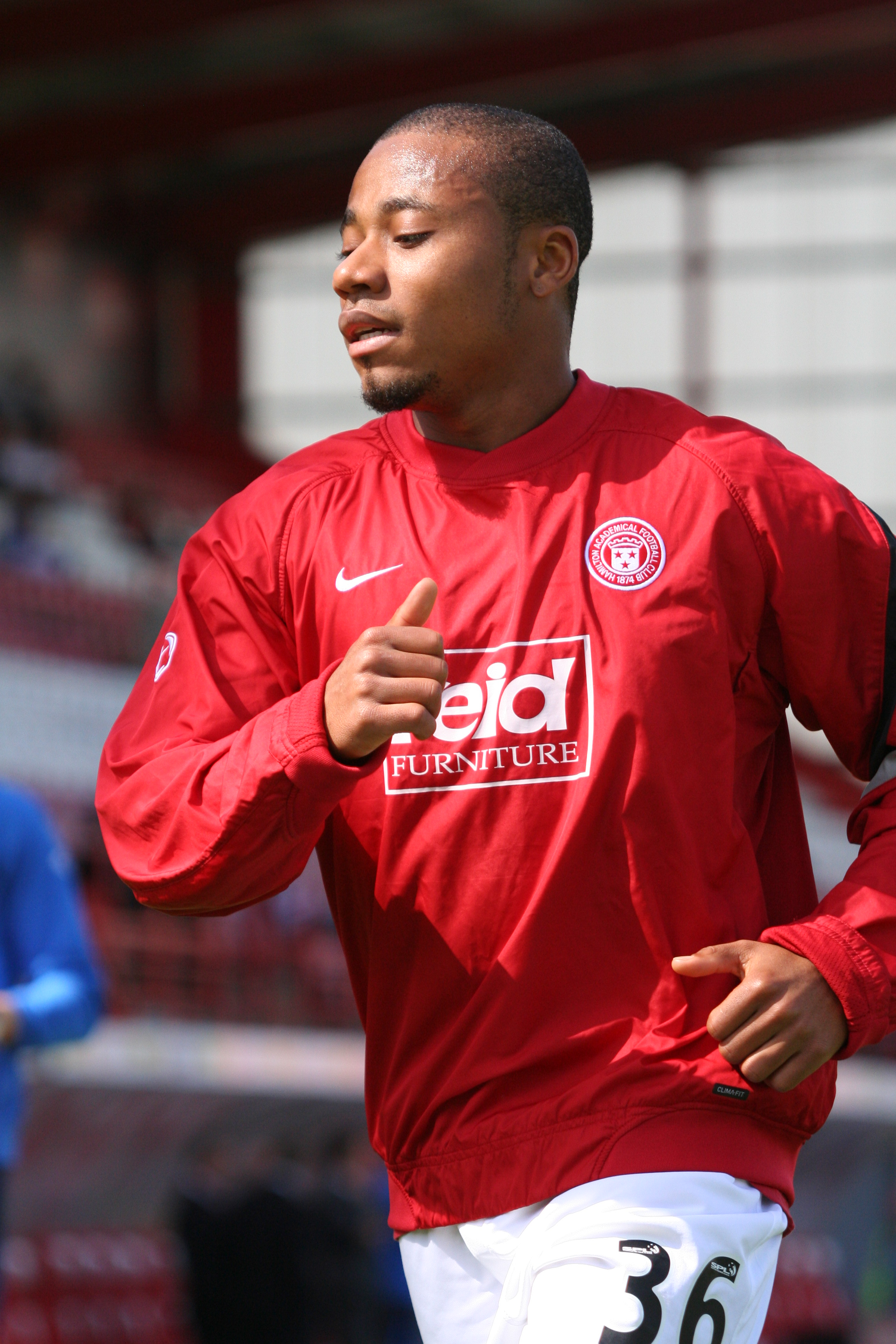 Hamilton vs Kilmarnock - 2-1